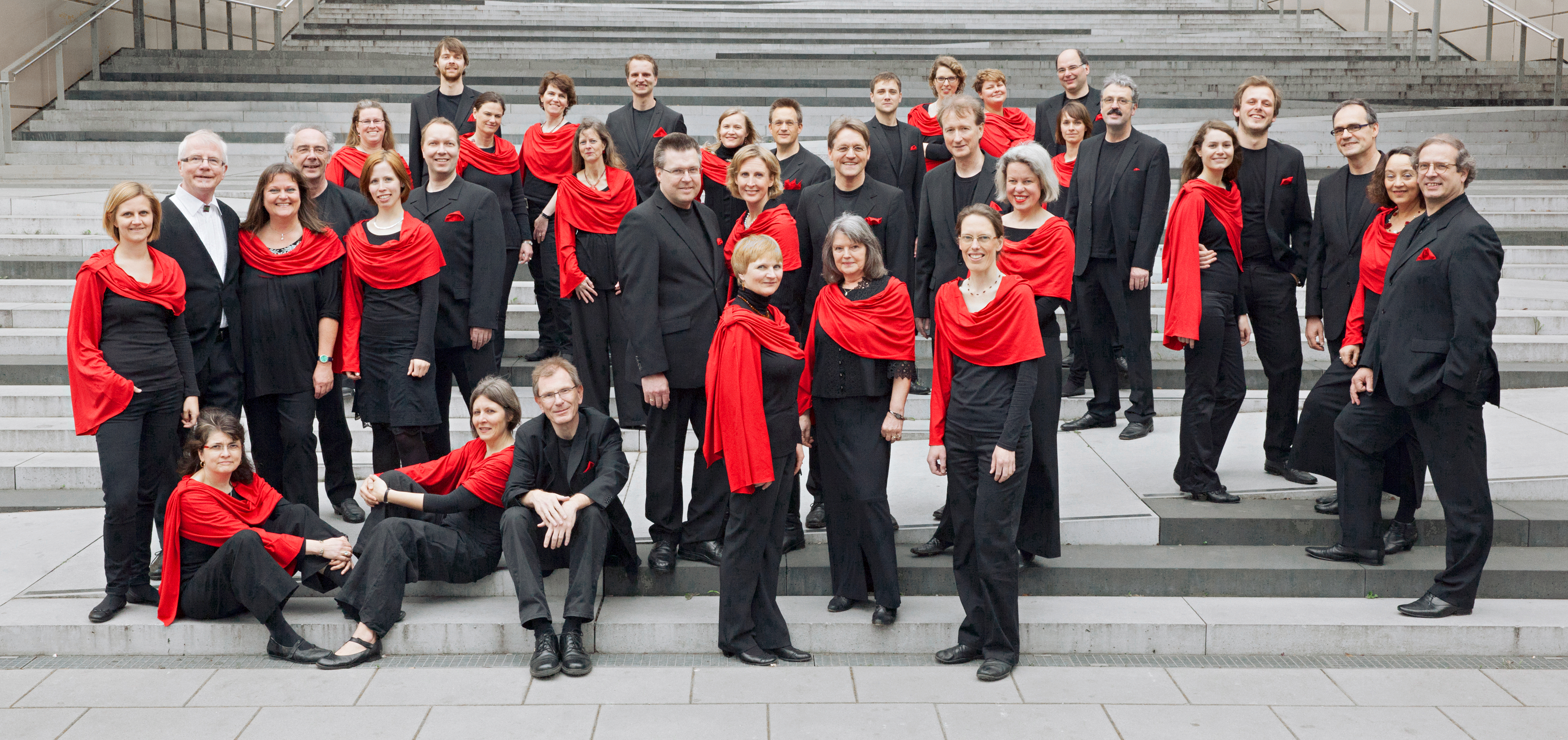 Chorfoto Carmina Mundi, April 2014